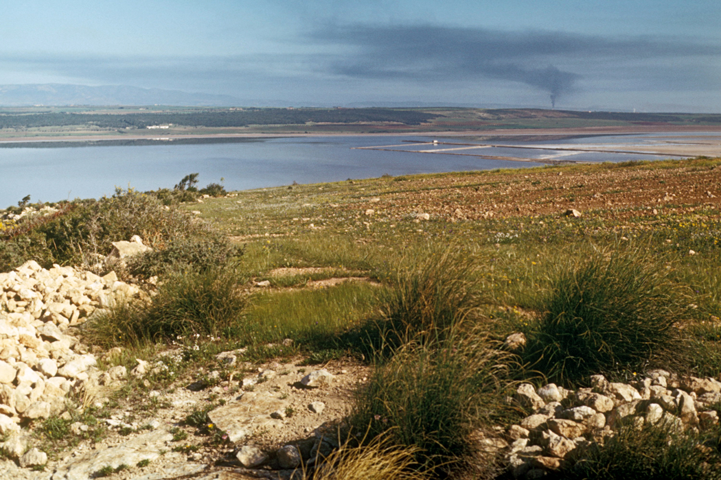 Sebkha d'Arzew (Algérie) : vue d'ensemble du lac salé. A droite, dans le lac, les bassins où l'on extrait le sel. Au nord des salines : le Djebel el Hallouf. Proches des marais de la Macta, cette zone humide présente aussi un intérêt pour l'avifaune : les Flamants roses, par exemple, la fréquentent.